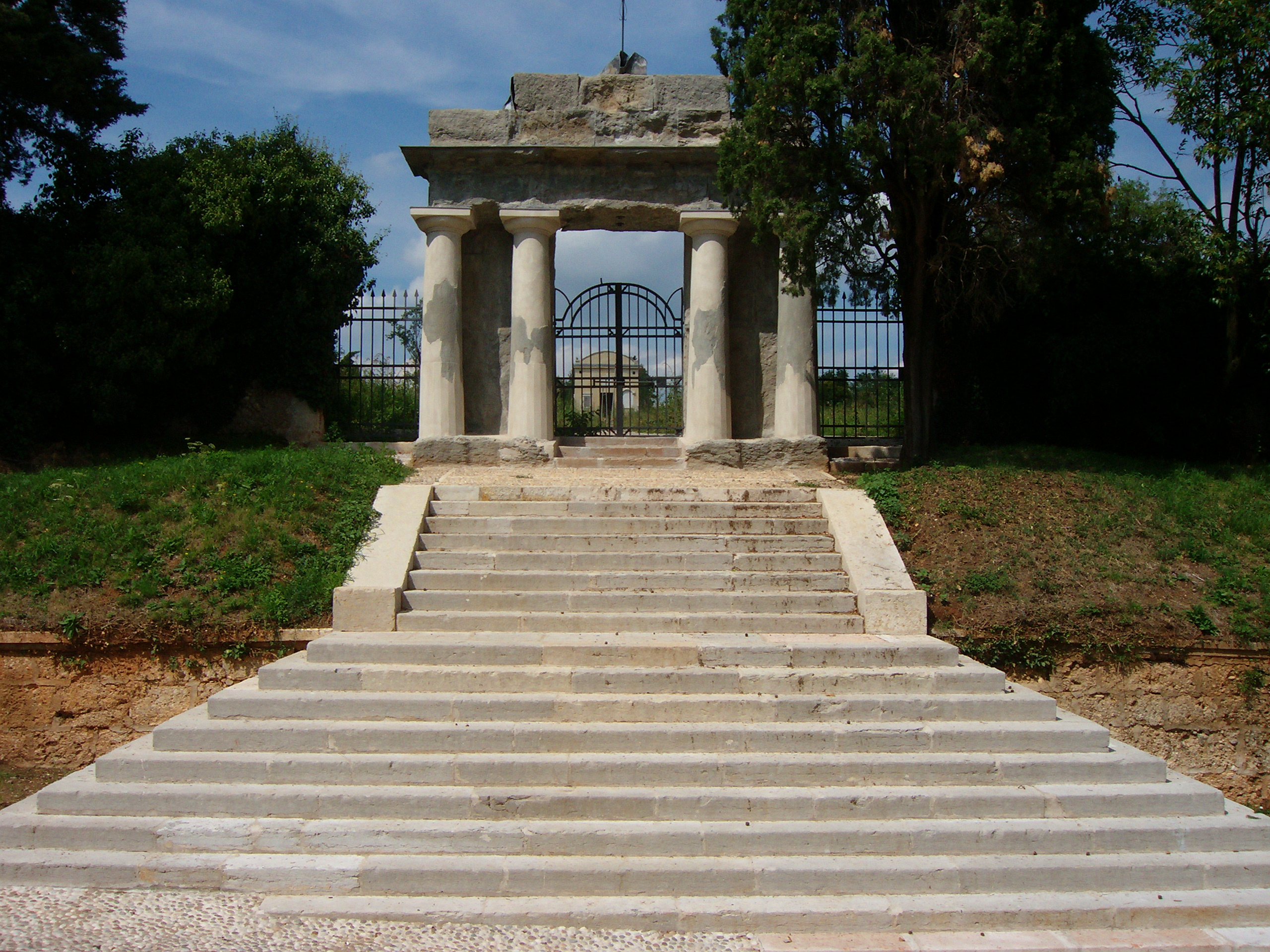 Vecchio cimitero a Santa Maria in Colle, in uso fino al 1930 circa